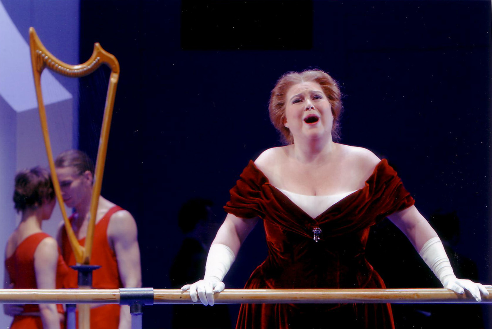 foto van wiebke göetjes ontvangen van wiebke göetjes zelf. Voorlopig gebruik tot er meer duidelijkheid is over de auteursrechten situatie :Afbeelding:Wiebke Göetjes portret.jpg, :Afbeelding:Wiebke göetjes in Elisabeth Tannhaeuser Akt1.jpg - gi - Siebrand (overleg) 12 jan 2007 14:20 (CET) Was in contact met onderwerp van foto in 2004. Heb nog een e-mail gezonden met de vraag voor herbevestiging en licentie keuze --Walter 19 jan 2007 23:22 (CET) Heb reactie ontvangen maar ondanks dat ik zeer duidelijk was dat ik een uitdrukkelijke toezegging nodig had dat de afbeeldingen onder een bepaalde licentie vrij diende te worden gegeven kreeg ik niet meer dan "de foto's zijn mijn bezit en er zitten geen rechten op.". Misschien is dat te beschouwen als "publiek domein"? --Walter 25 jan 2007 00:19 (CET) OTRS Ticket#: 2007020210007777 [1]